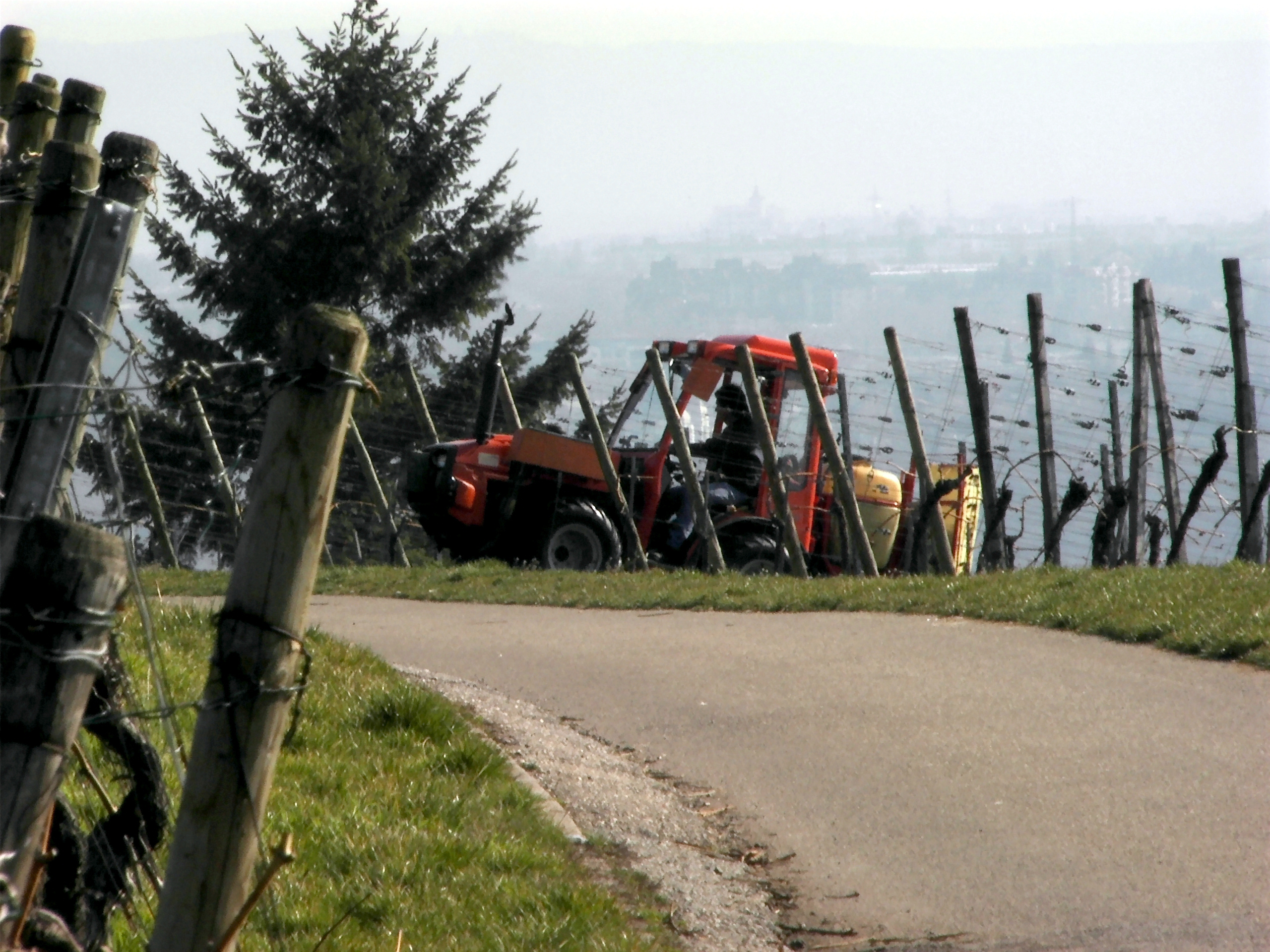 Weinbau nach Flurbereinigung in Deutschland, Kleintraktor im Einsatz